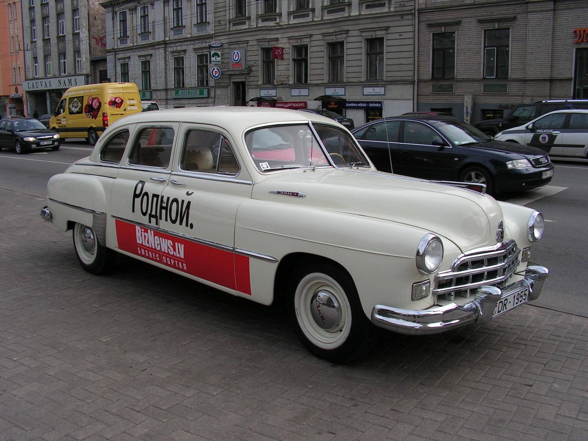 ZIM (ЗИМ) fotograferad i Riga, Lettland